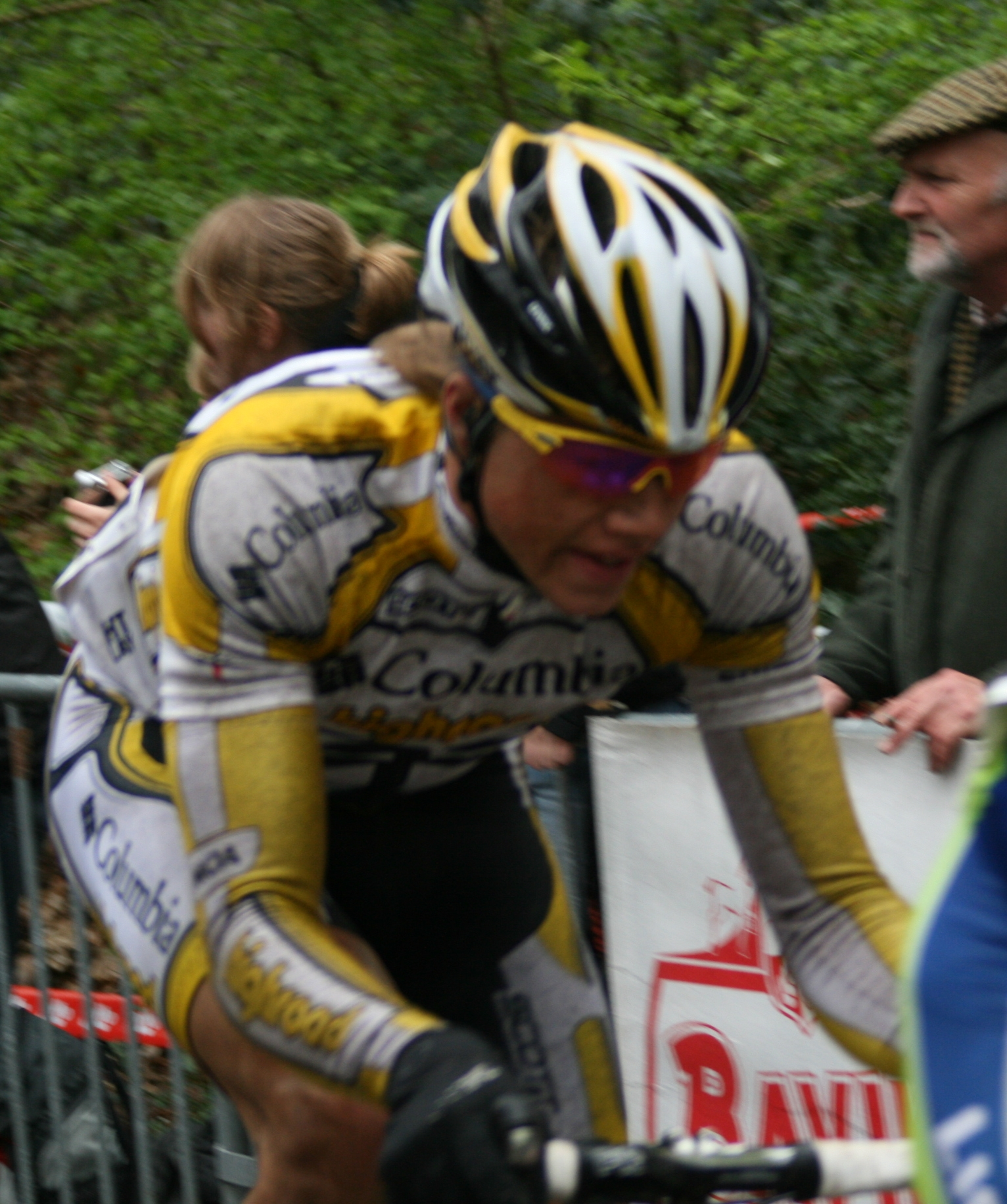 Gent-Wevelgem 2009 : Edvald Boasson Hagen au mont Kemmel